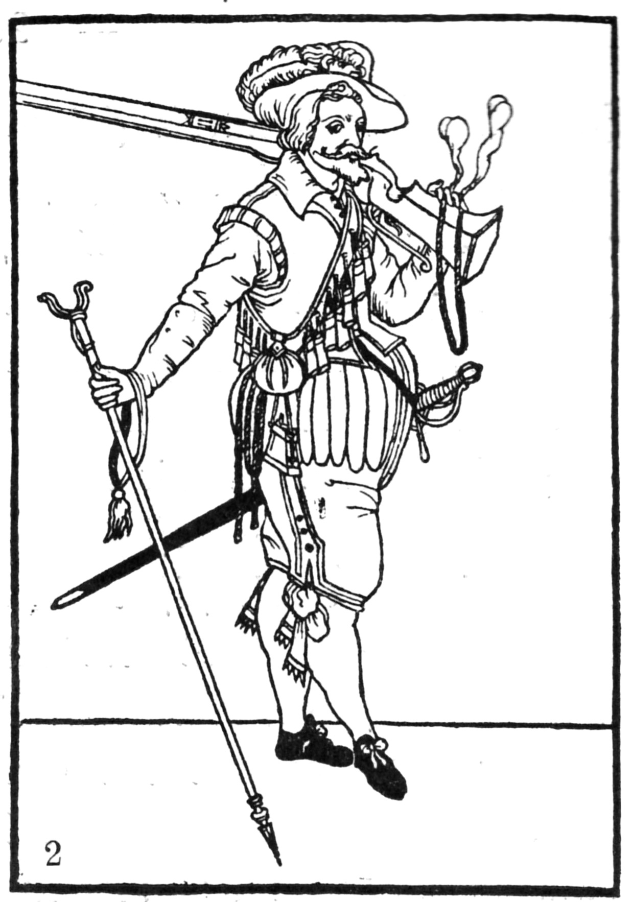 Soldatentypen aus dem Beginn des 30 jährigen Krieges. 2. Musketier mit dem "Forket" (Gabel) in der Hand. (Trägt gar keine Eisenrüstung.) Aus: Waffenhandlung von den Roehren, Musquetten und Spießen. Gestalt nach der Ordnung des Hochgeborenen Fürsten und Herrn, Herrn Moritzen Printzen von Oranien usw. Frankfurt a. M. 1609.